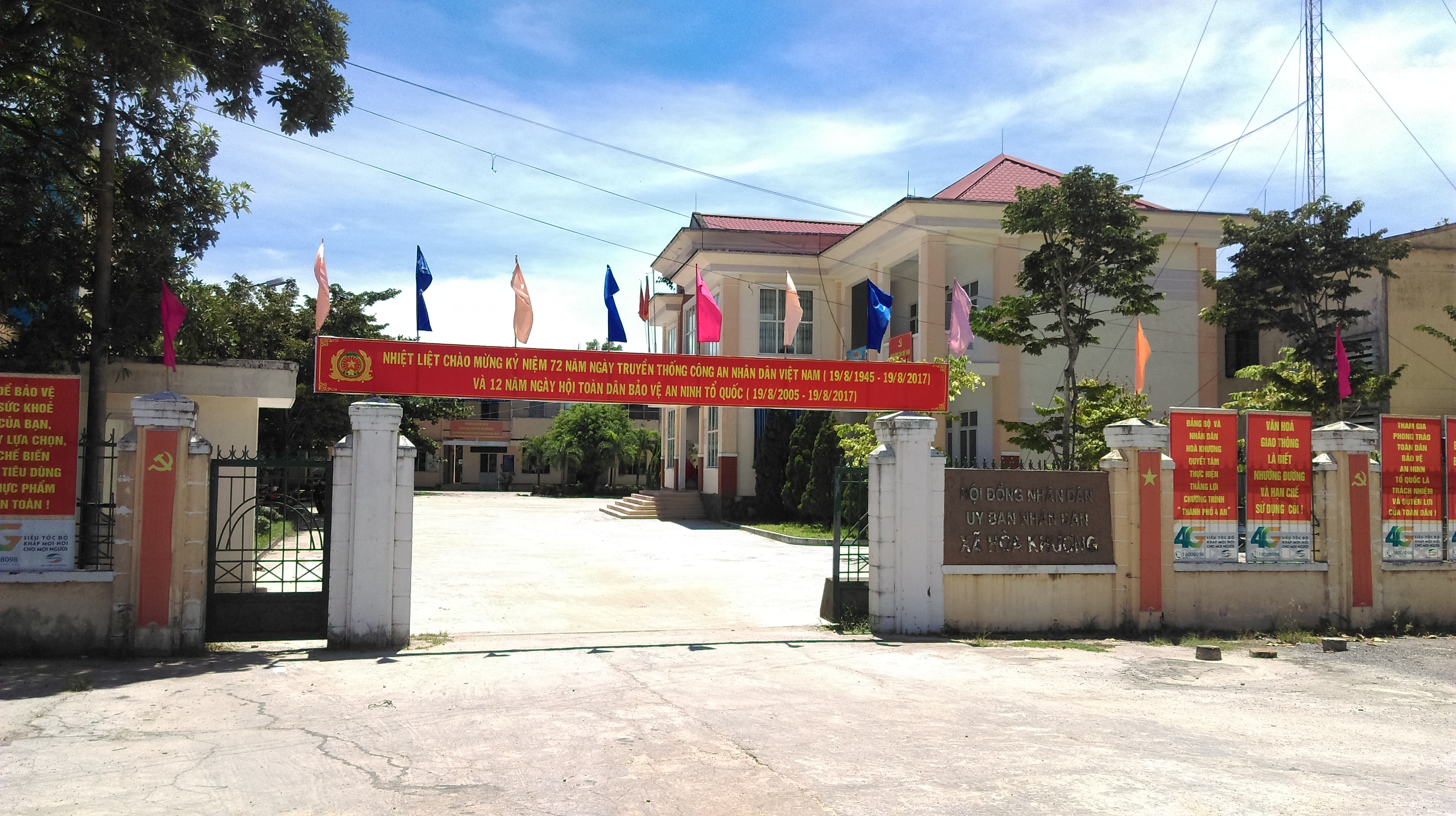 UBND xã Hòa Khương, Hòa Vang, Đà Nẵng